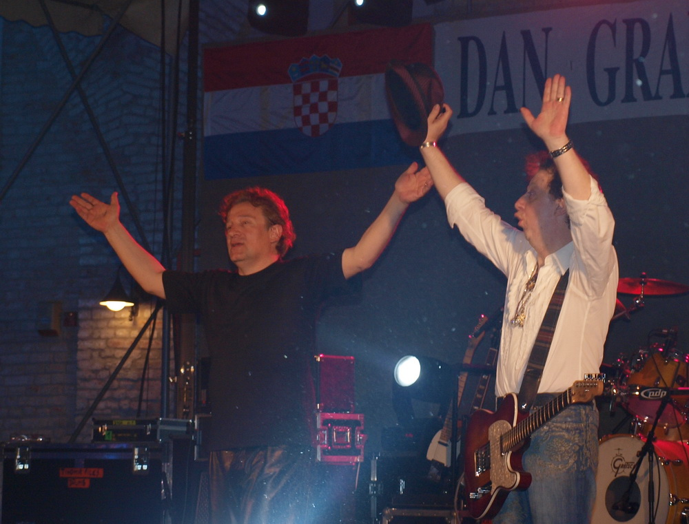 Prljavo kazalište 16. svibnja 2009. godine u Slavonskom Brodu.